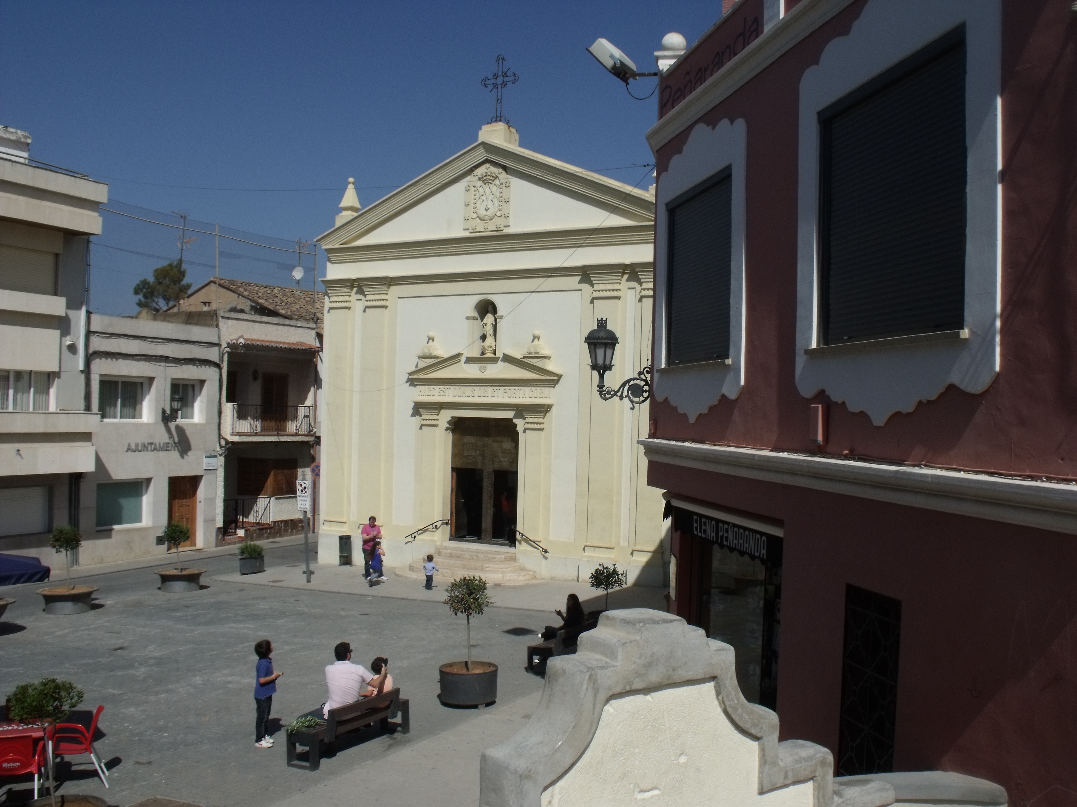 Montserrat: Plaça de l'Església.